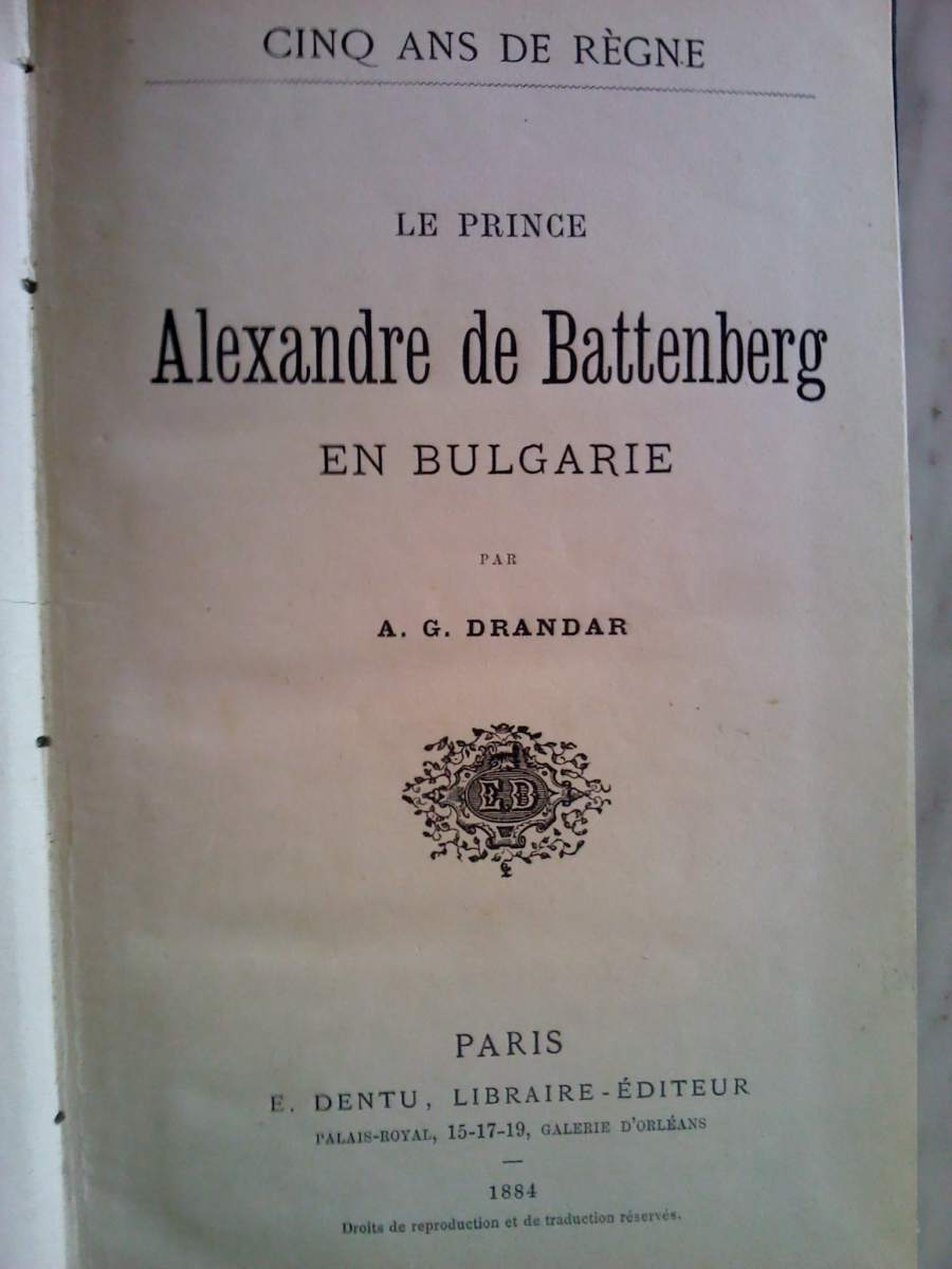 Cinq ans de regne. Le prince Alexandre de Battenberg en Bulgarie.